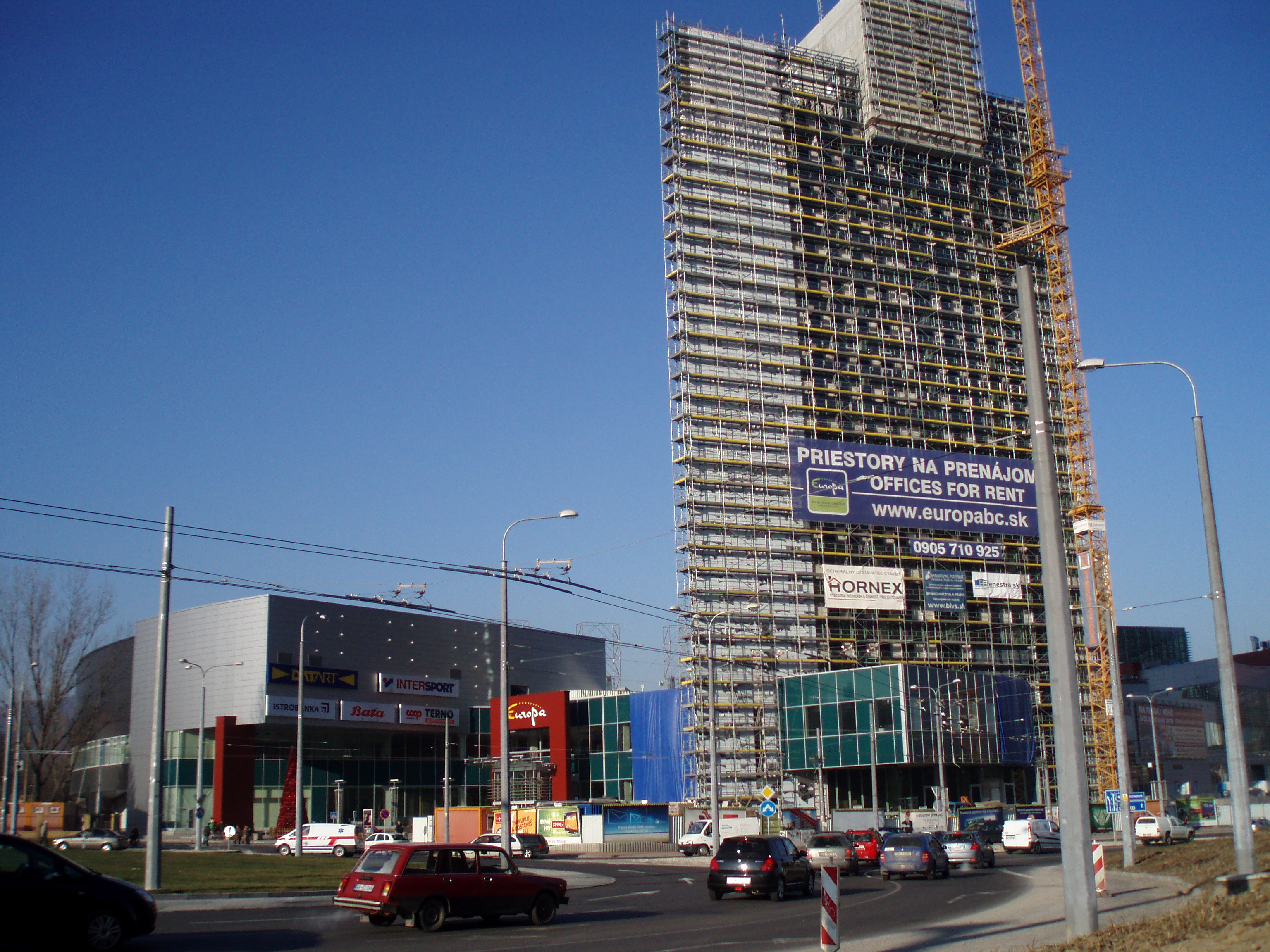 Obchodno-zábavné stredisko Europa Shoping Center v Banskej Bystrici